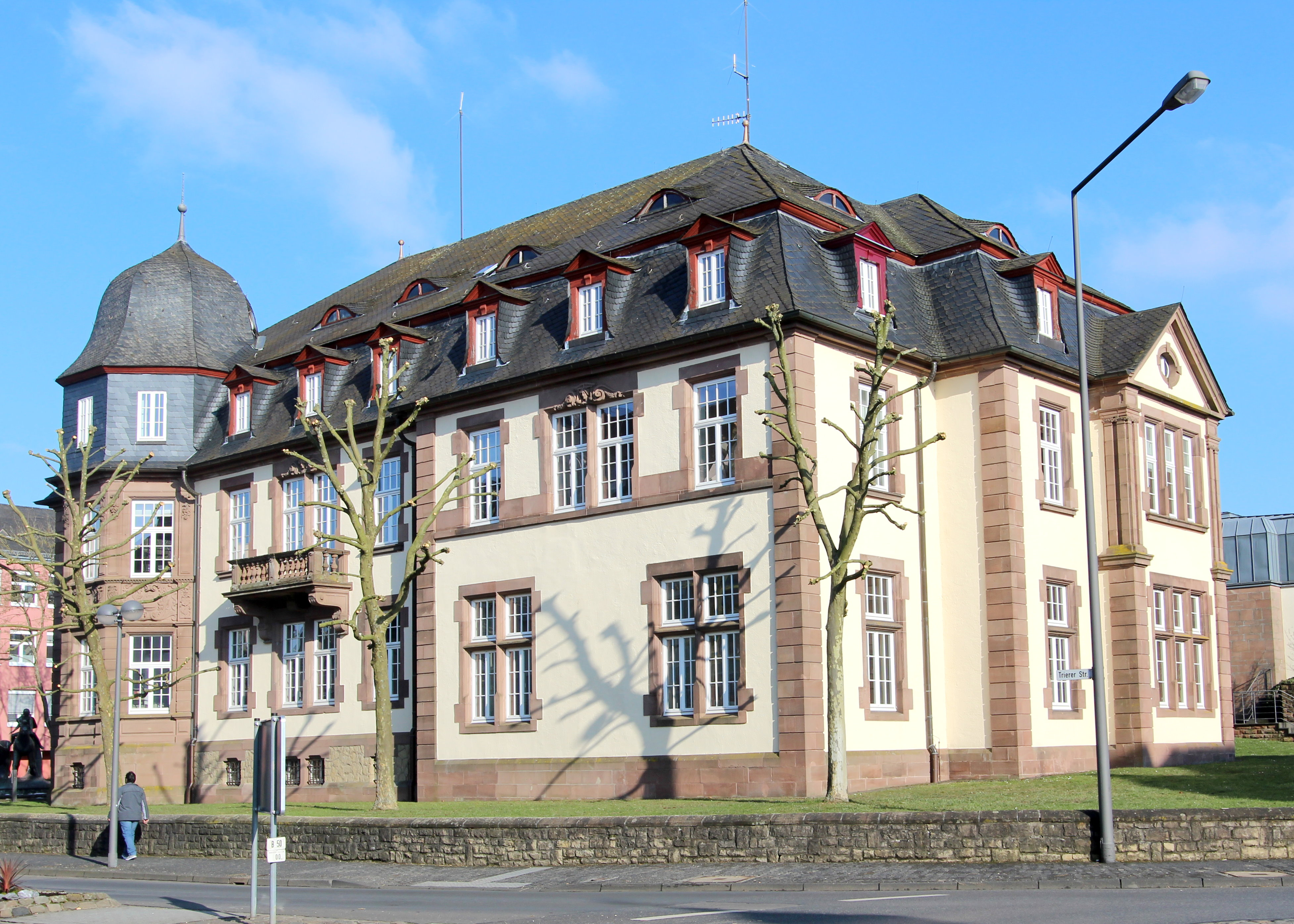 54634 Bitburg, Trierer Straße 1. Ehemaliges Kreisständehaus; monumentaler späthistoristischer Putzbau, Erkerturm mit Neurenaissance- und Barock-Motiven, 1905/06, nach Teilzerstörung 1944/45 vereinfacht wiederaufgebaut. Aufnahme von 2018.